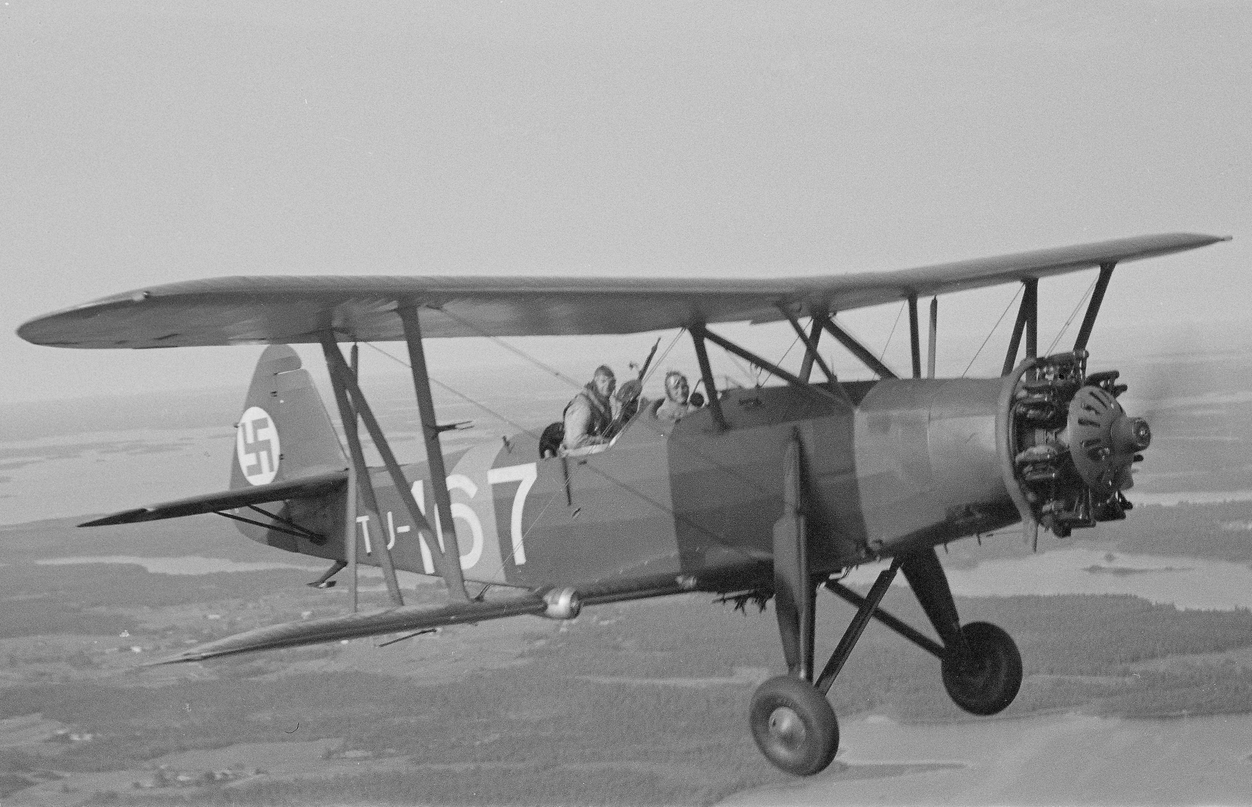 Harjoituskone Tuisku ilmassa valokuvttuna toisesta koneesta. Kuva on leikattu versio tiedostosta VL Tuisku (SA-kuva 132309).